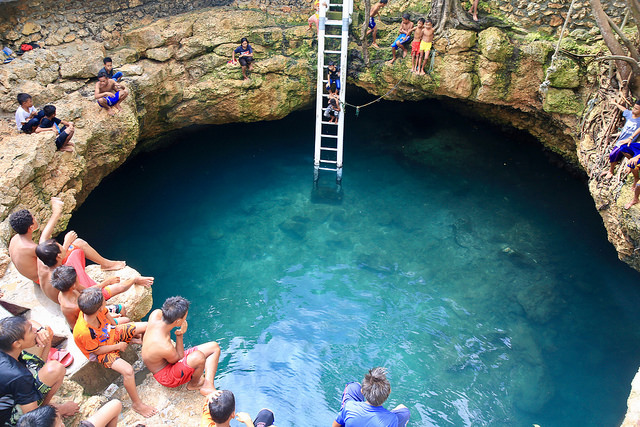 Pusentasi, Donggala adalah tempat wisata di Palu yang unik karena berbentuk seperti sumur dengan air laut yang jernih kebiruan